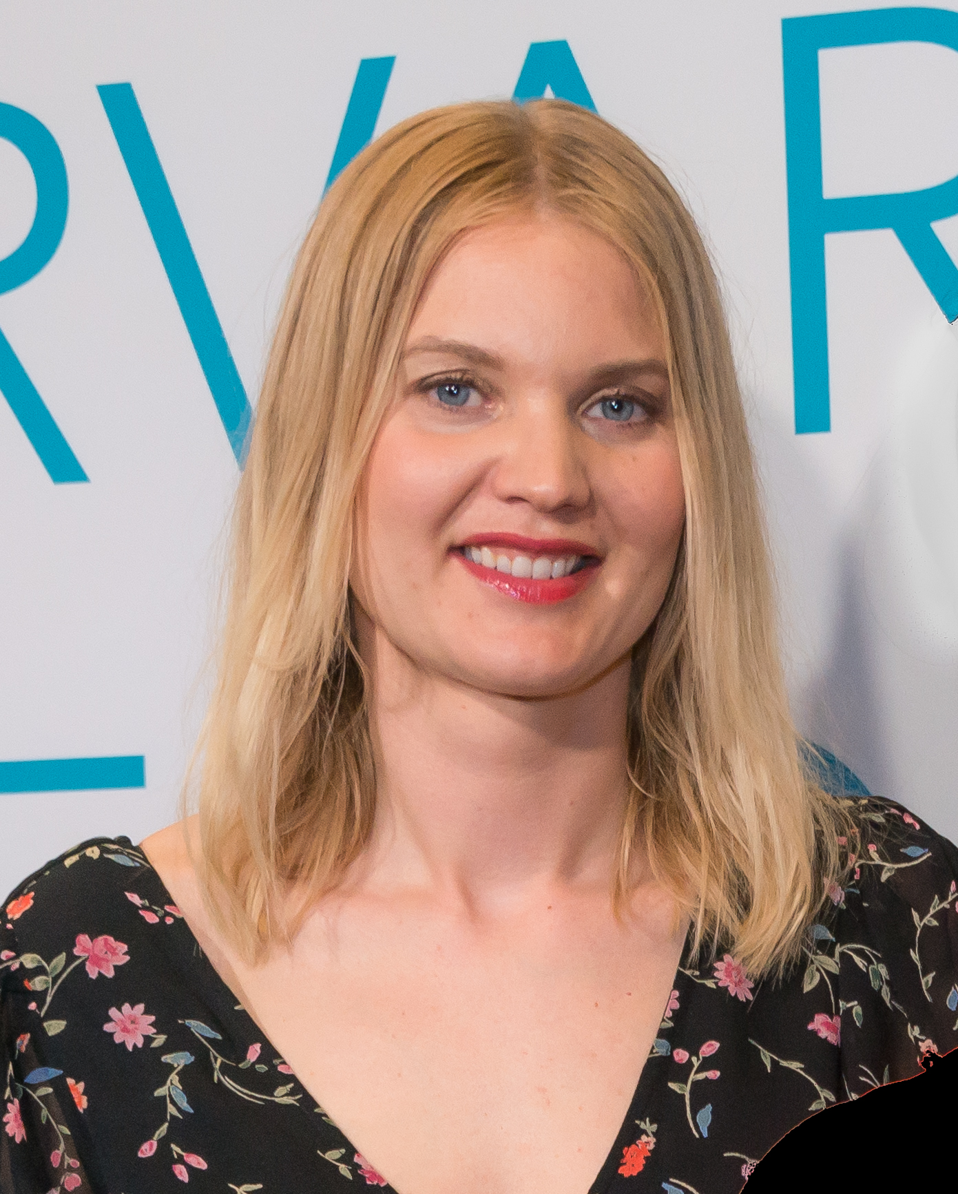 Emma Frans, Sommarvärd i P1, på röda mattan på väg in i Berwaldhallen i Stockholm den 13 juni 2019.